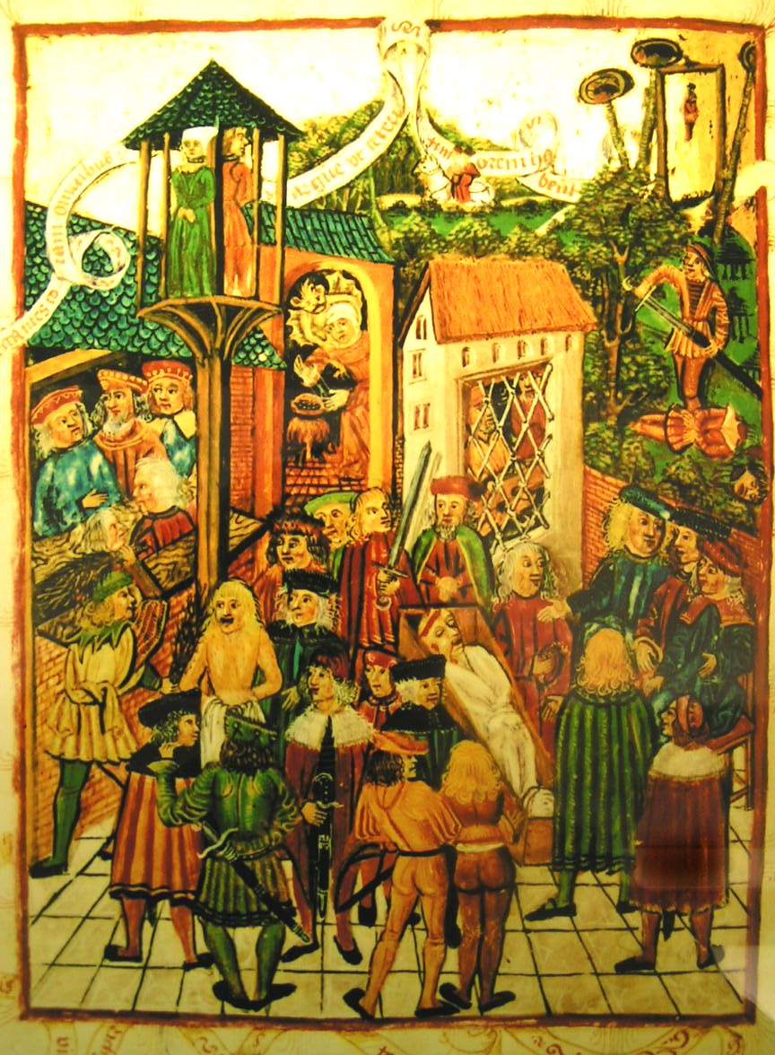 Ausschnitt aus dem Hamburger Stadtrecht von 1479, Aspekt Verbrechen (Ausschnitt)